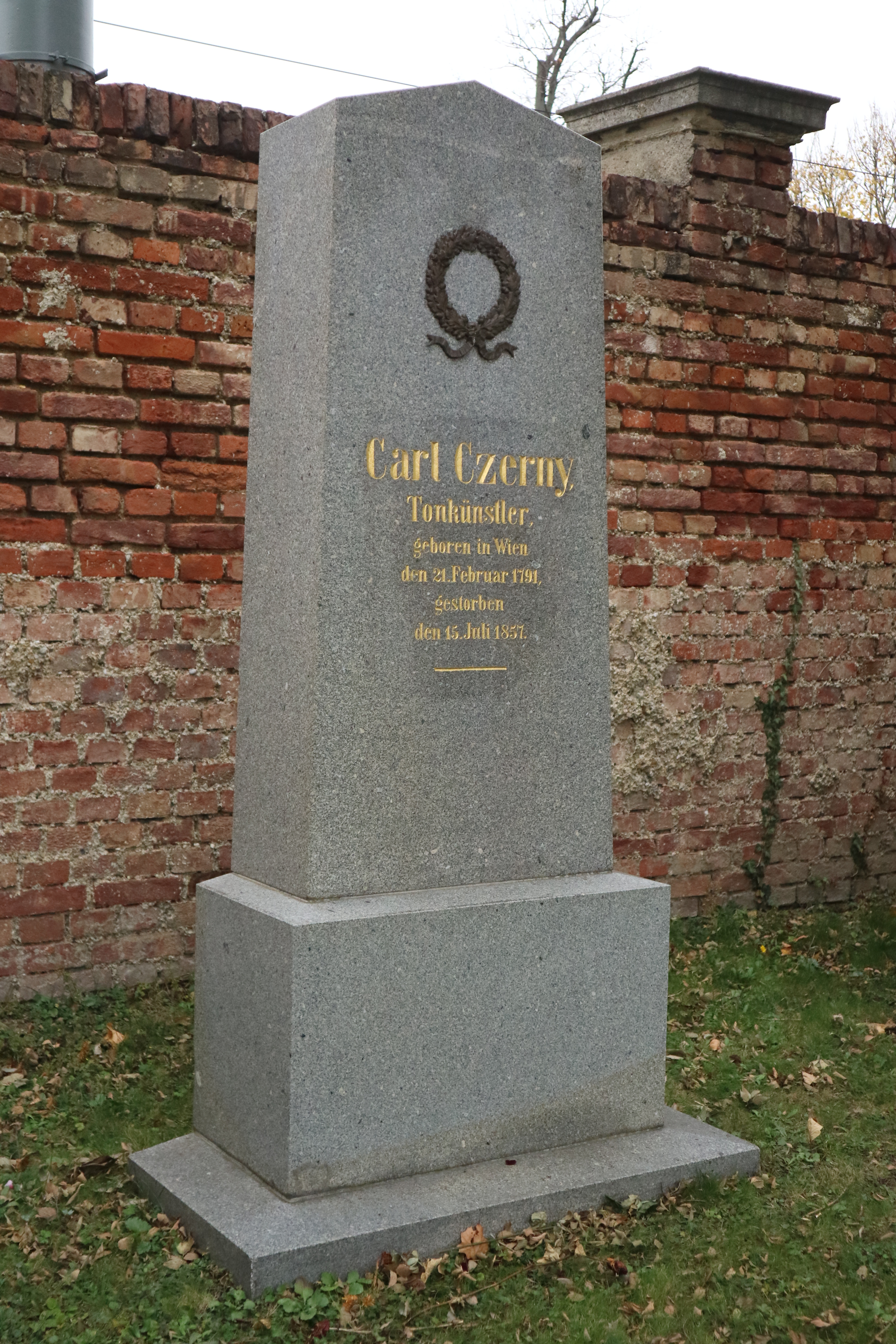 Ehrengrabmal für Carl Czerny am Wiener Zentralfriedhof